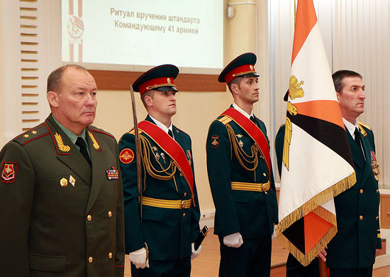 Генерал-лейтенант Александр Владимирович Дворников в 41-й армии Центрального военного округа